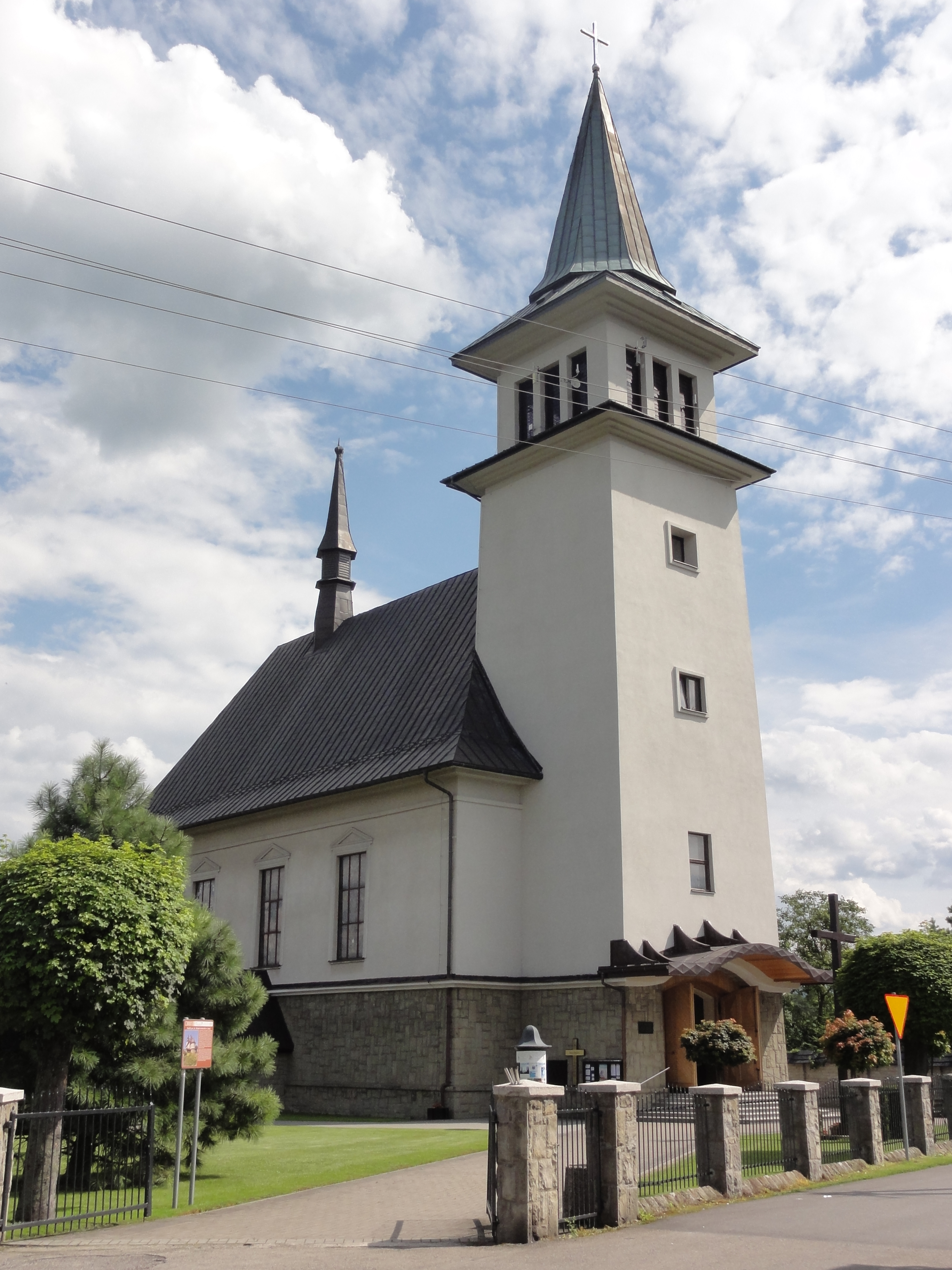 Leśna Kościół pw. św. Michała Archanioła